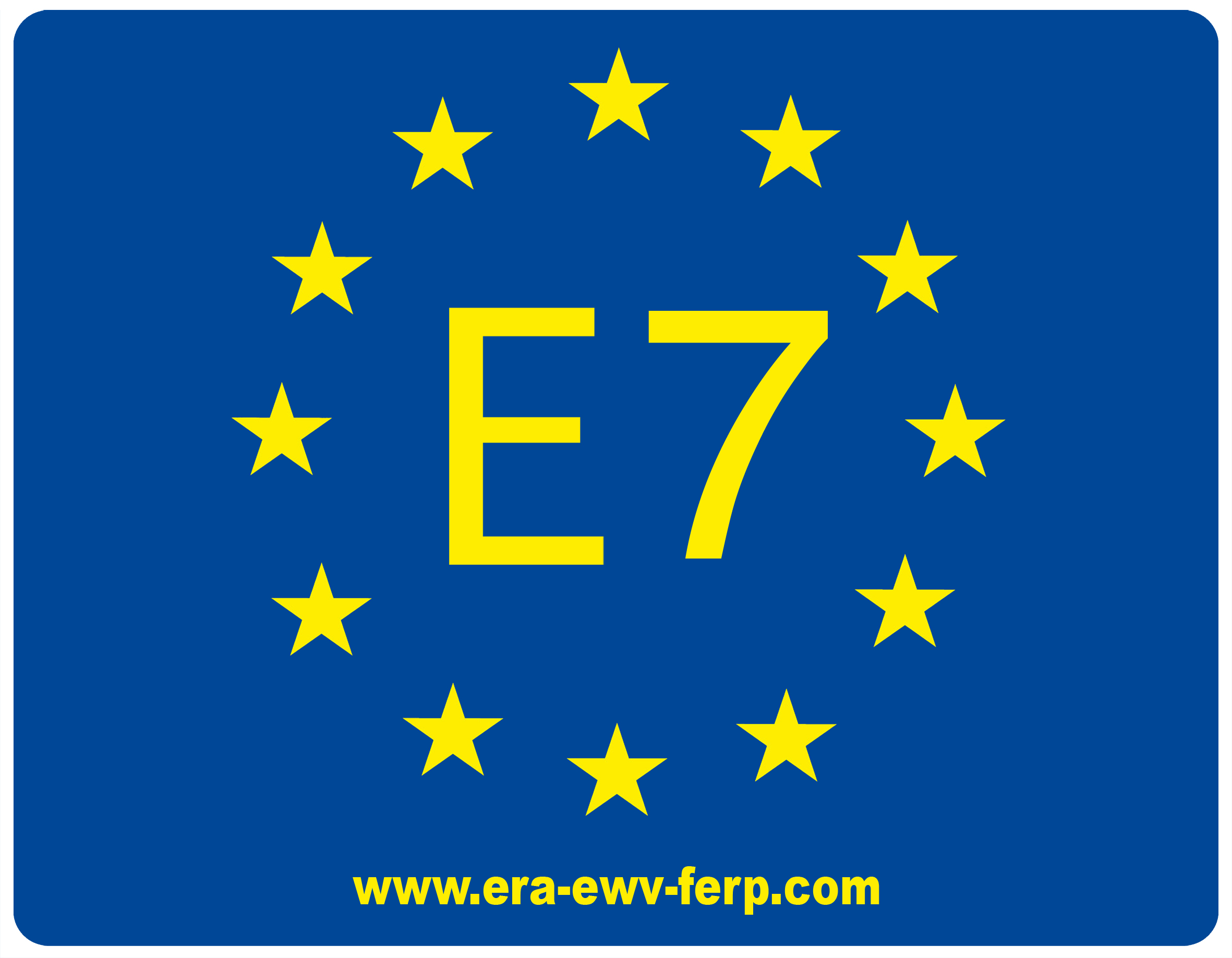 Zeichen des Europäischen Fernwanderwegs E7